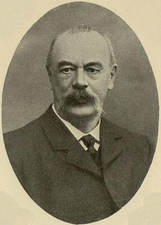 Ilya Lyudvigovuch Shrag, a member of the First Russian State Duma